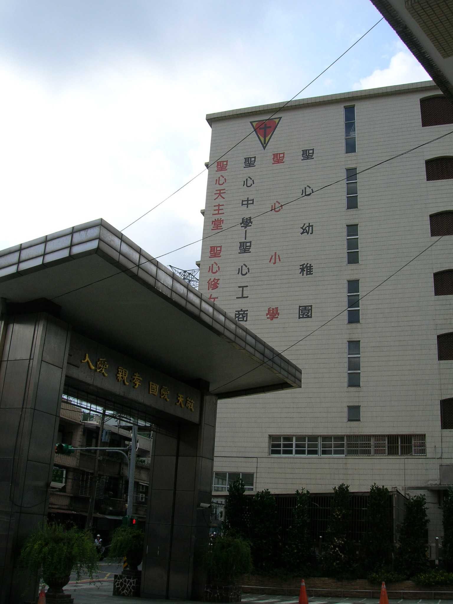 基隆市聖心高中校門。